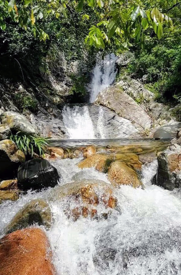 Arroyo Negra, poblado de Las Minas; Mpio. de Tlacoachistlahuaca, Gro.